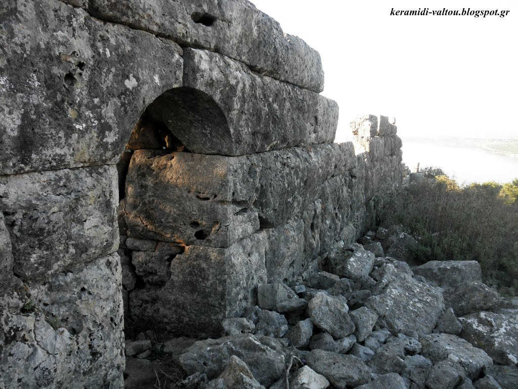 Αρχαία Λιμναία, Αμφιλοχία Αιτωλοακαρνανίας